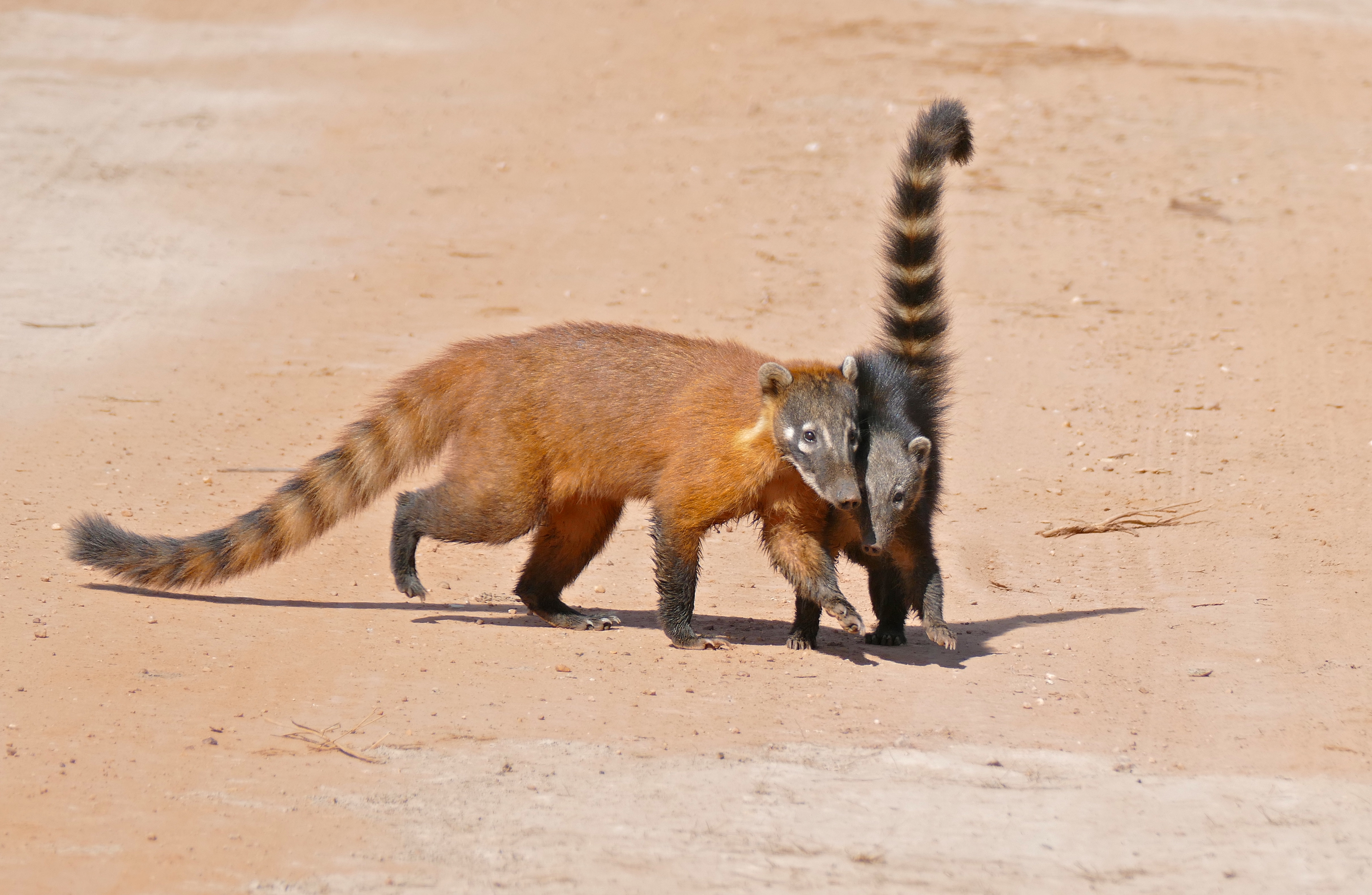 Pouso Alegre, Transpantaneira, Poconé, Mato Grosso, BRAZIL